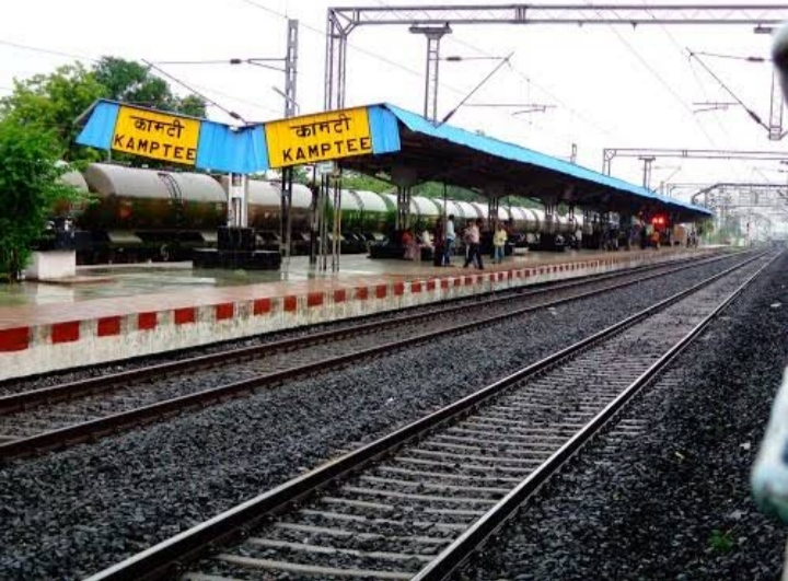 कामठी रेलवे स्टेशन